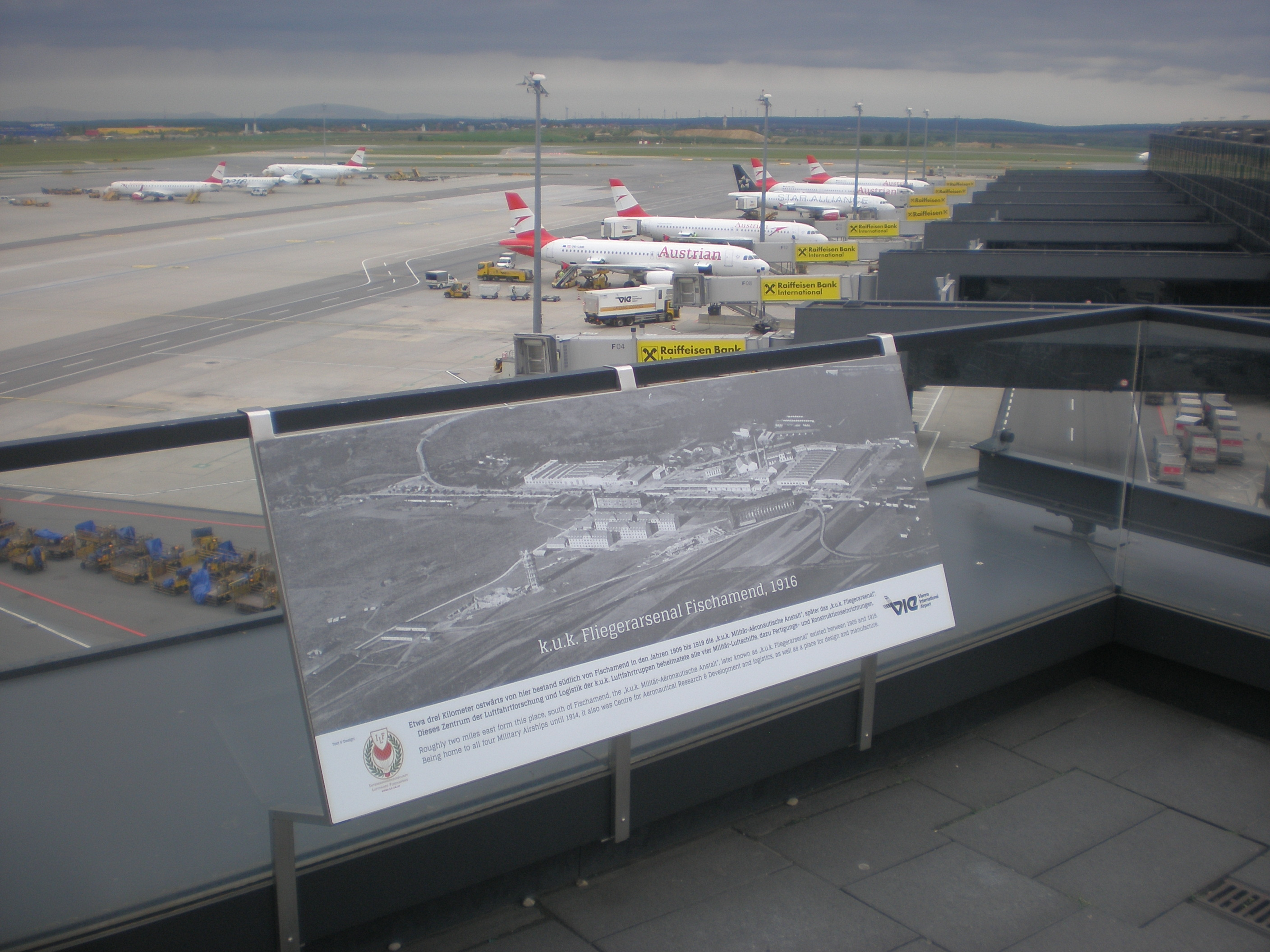 Tafel von VIE und ILF auf der Besucherterrasse zeigt ein Bild des Fliegerarsenals vor 100 Jahren im nahegelegenen Fischamend